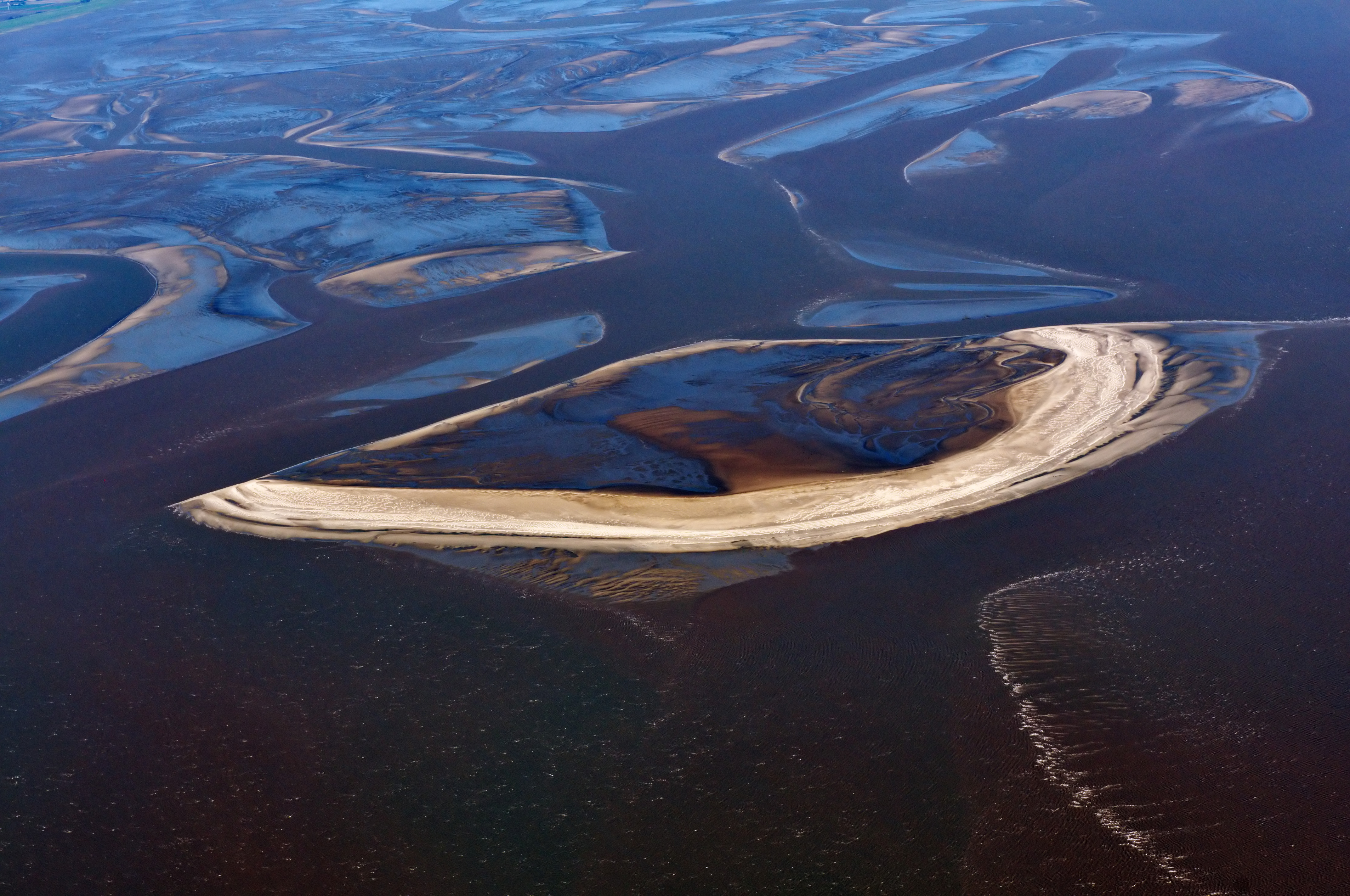 Fotoflug über das nordfriesische Wattenmeer - Trischen (von NW)